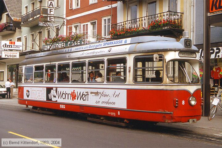 GM 8 - 1983